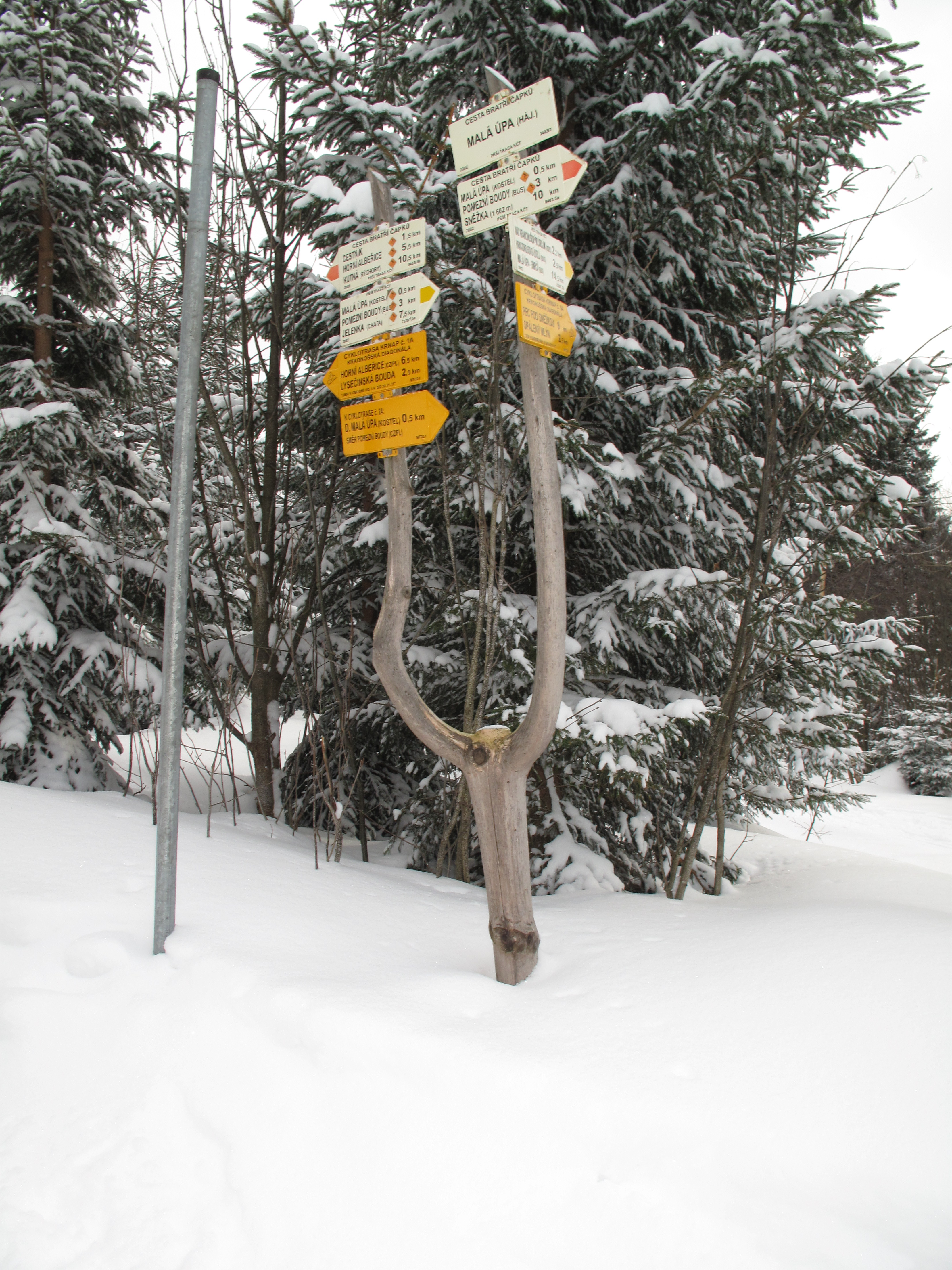 Malá Úpa, rozcestí